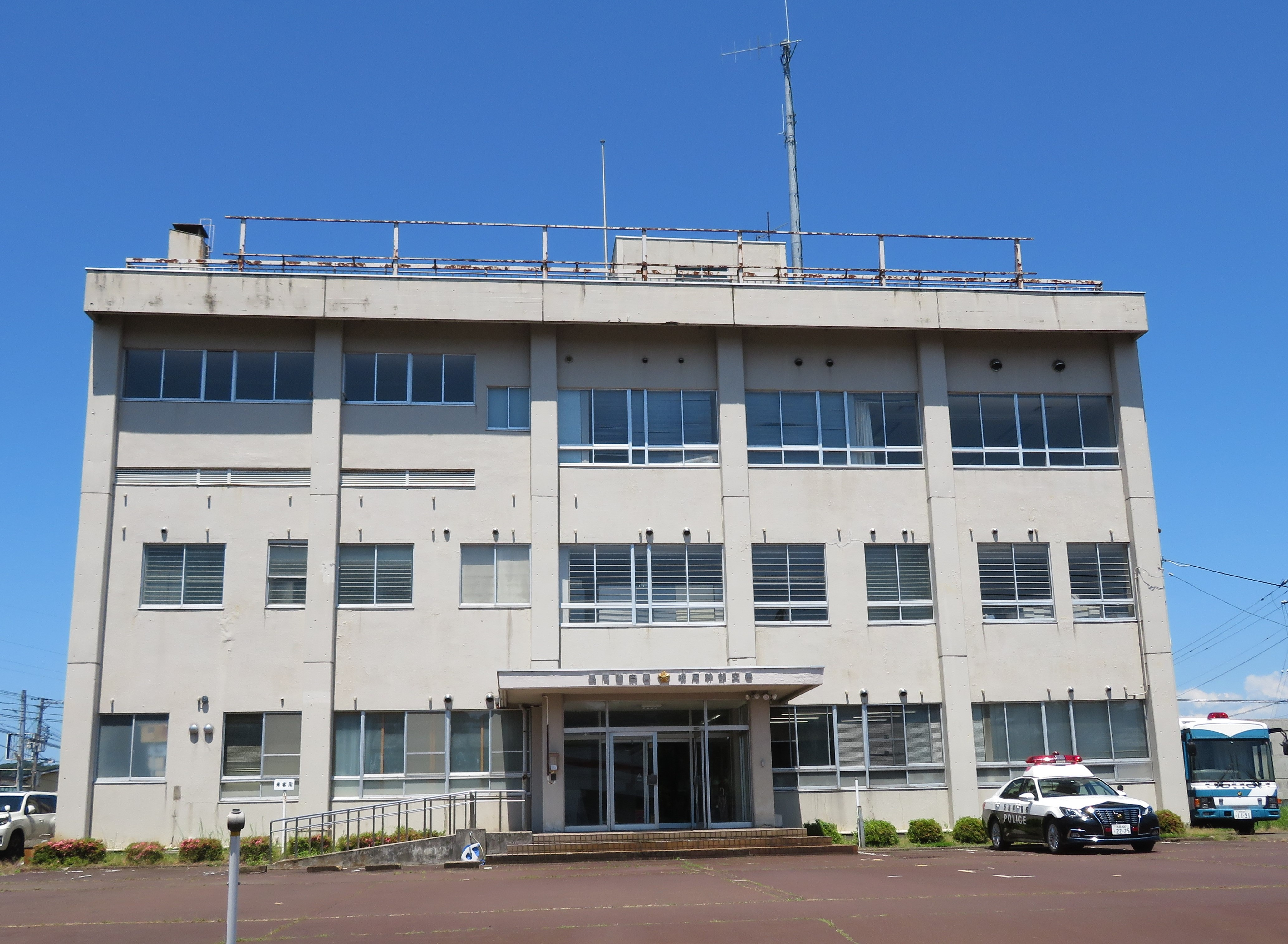 新潟県長岡市に所在する長岡警察署栃尾幹部交番（旧栃尾警察署）庁舎 Canon PowerShot SX720 HS